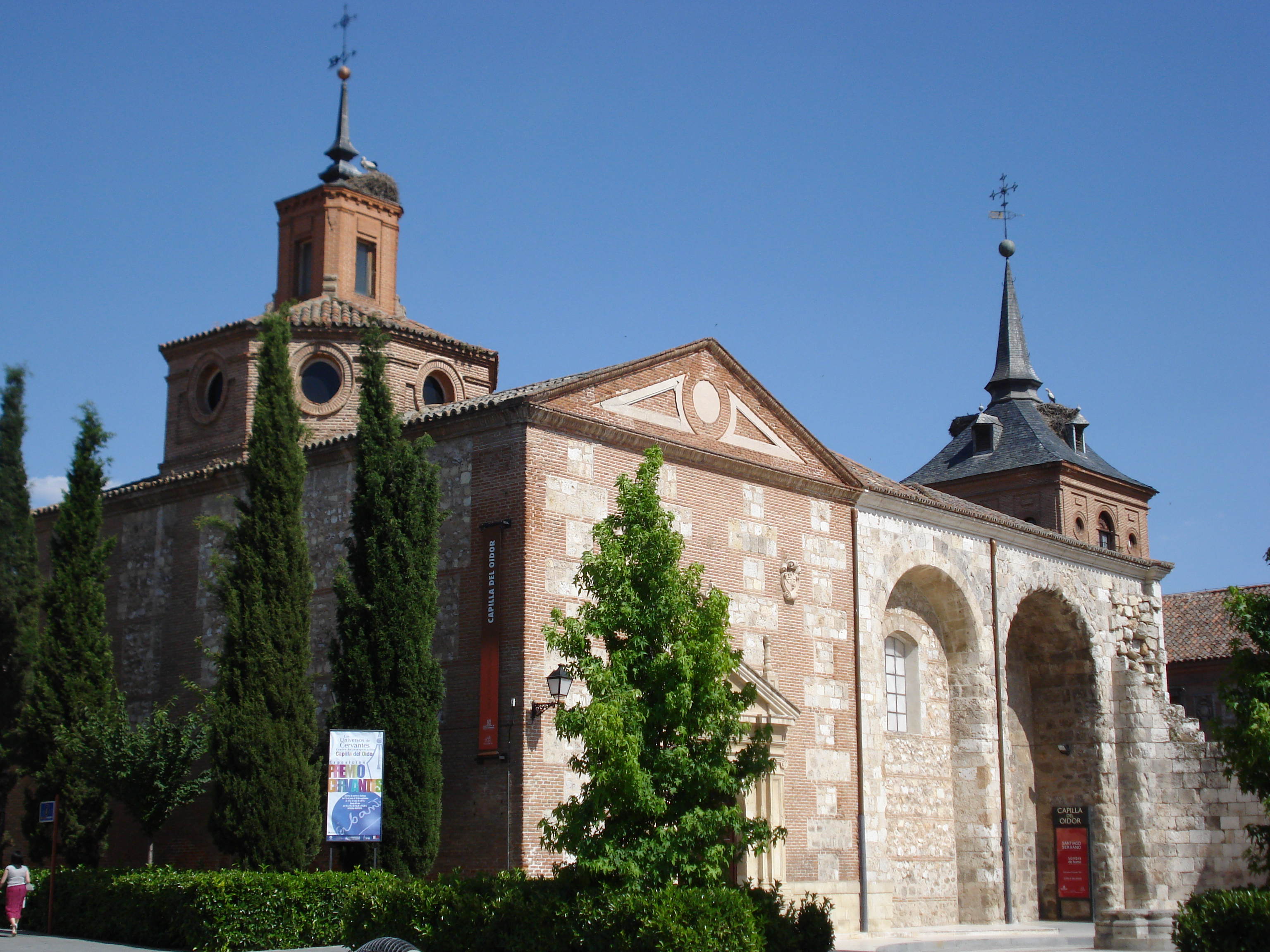 Capilla del Oidor, Alcalá de Henares, España.